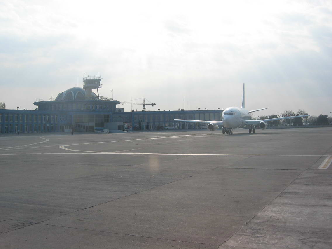 Bucharest Baneasa Airport apron